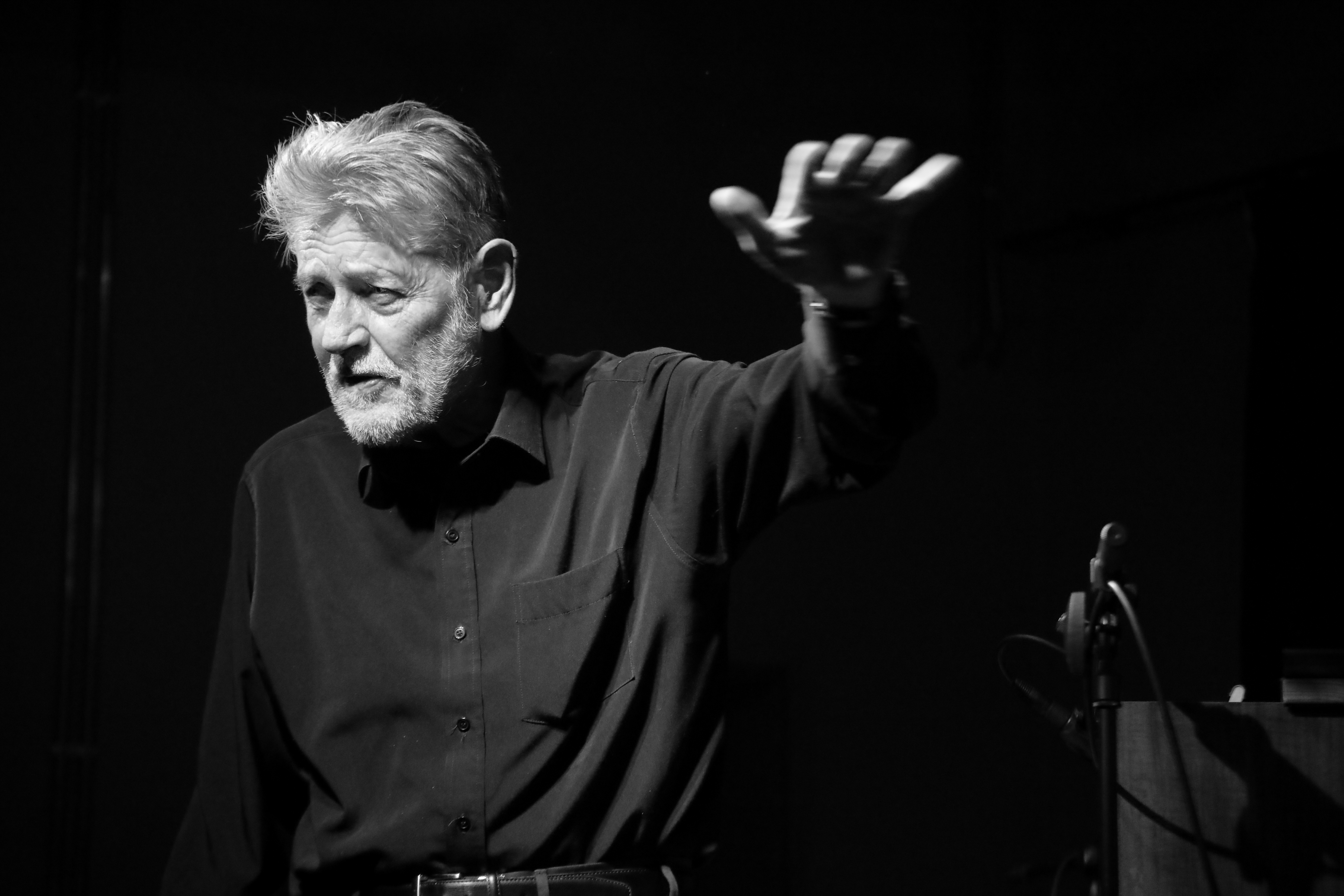 Das Schlippenbach Trio beim Konzert im Club W71, Weikersheim (2019): Alexander von Schlippenbach (Klavier), Evan Parker (Saxophon) & Paul Lytton (Schlagzeug).